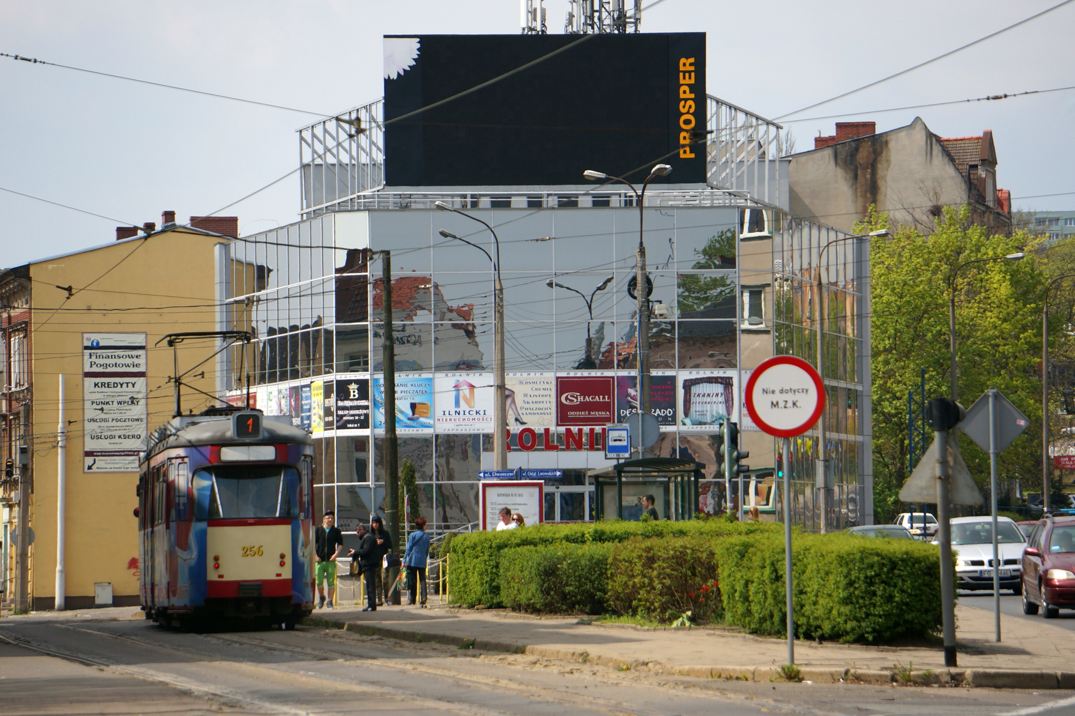 Gorzów Wlkp. Dom Towarowy "Rolnik" przy ul. Sikorskiego